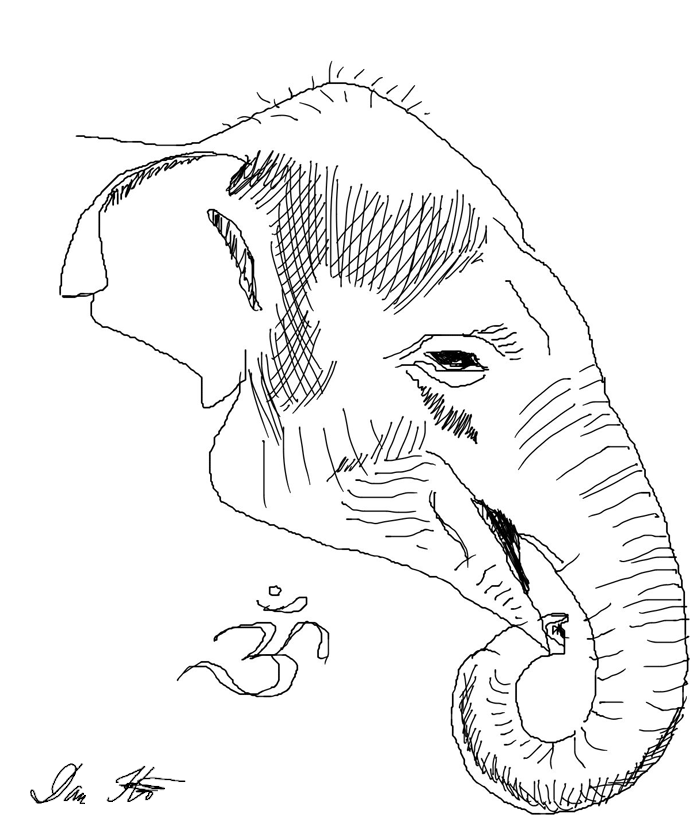 Karikatyr av elefanten Shiva på Skansen, tecknad av Dan Koehl 2010